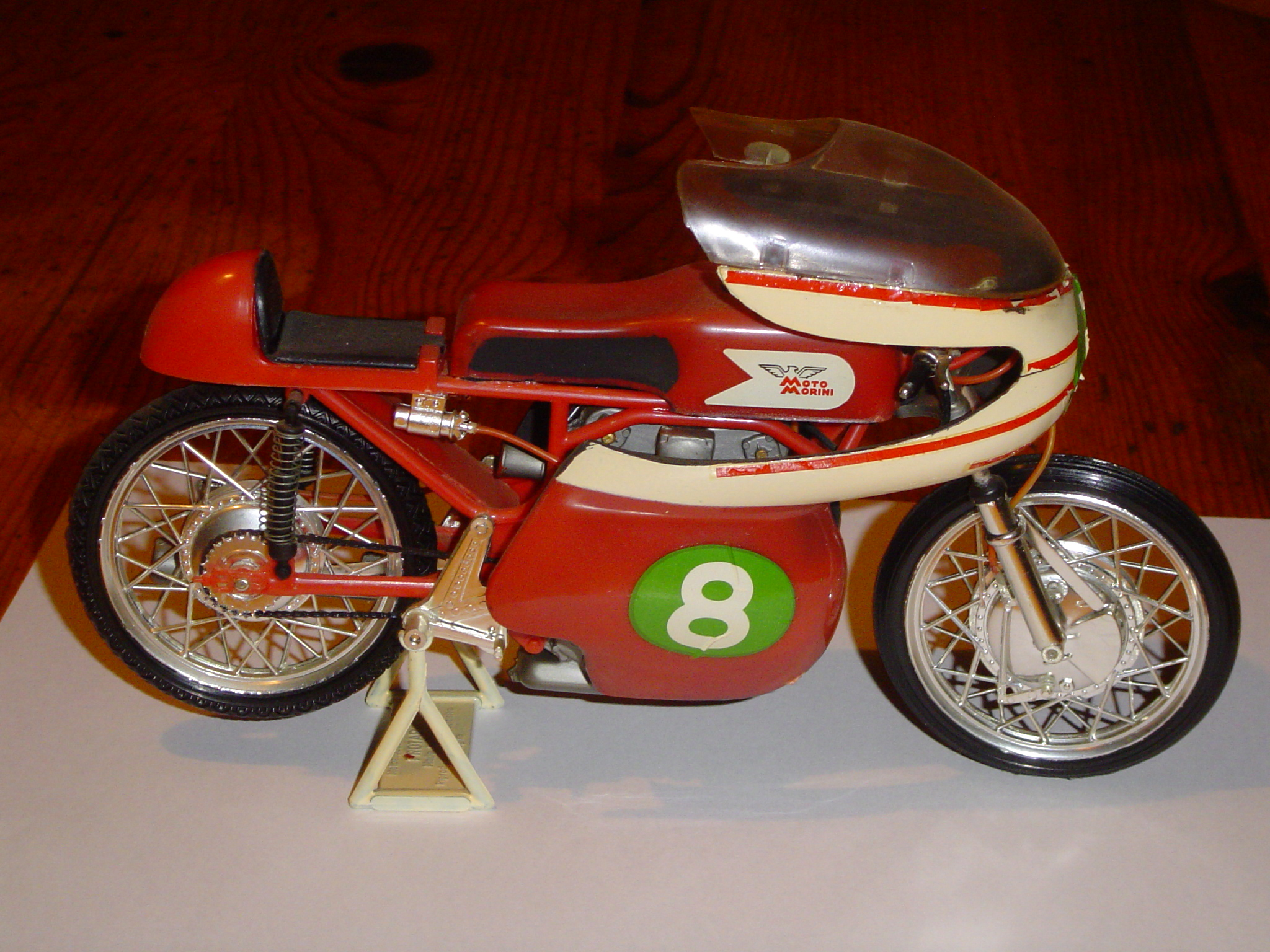 Provini's 250 Morini GP-racer. Tarquinio Provini reed deze 250 cc Moto Morini en produceerde hem later als schaalmodel...